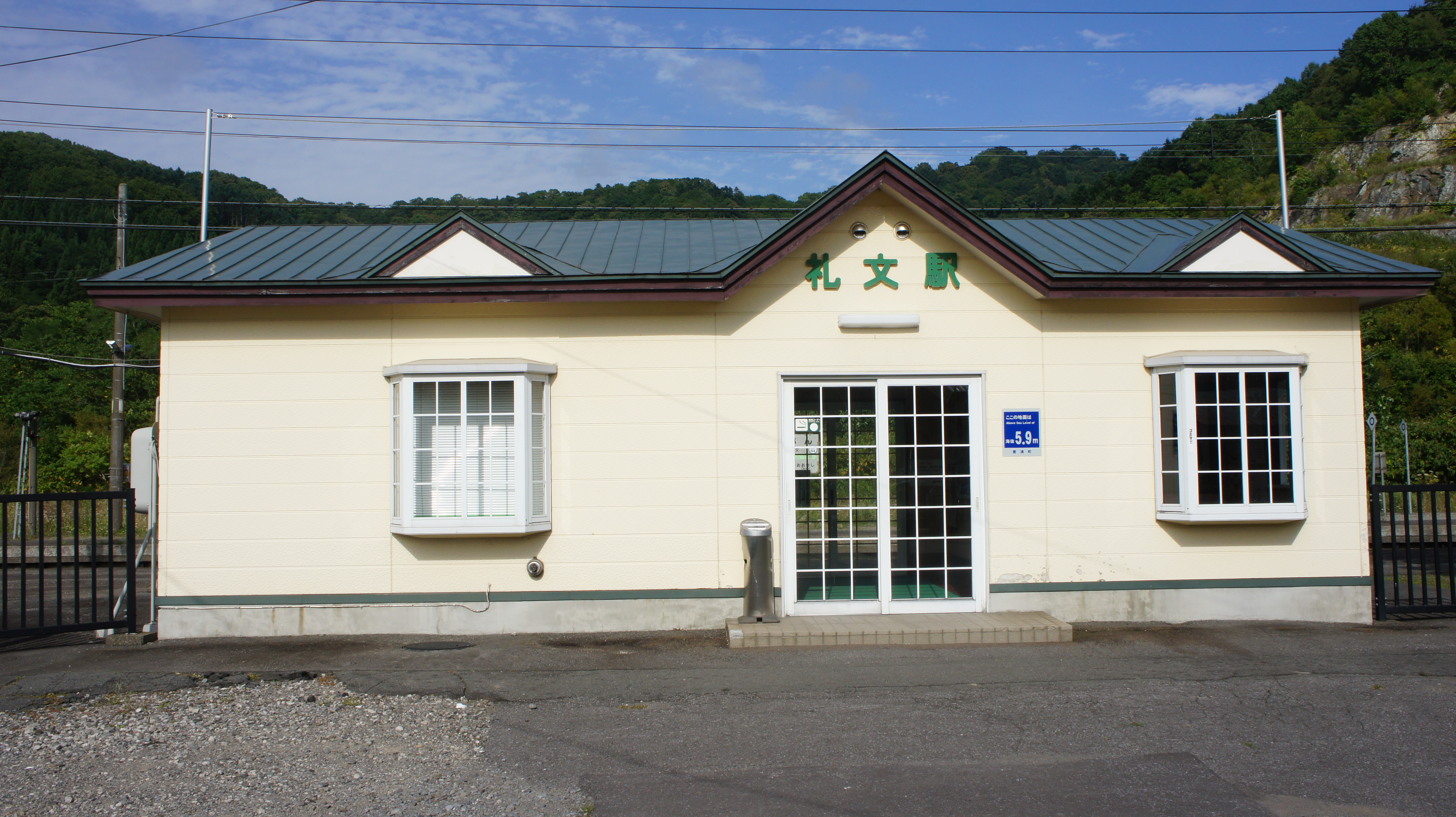 JR室蘭本線・礼文駅の駅舎